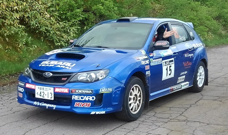 2019年ラリーモントレーにて、JN1クラスに参戦する新井大輝